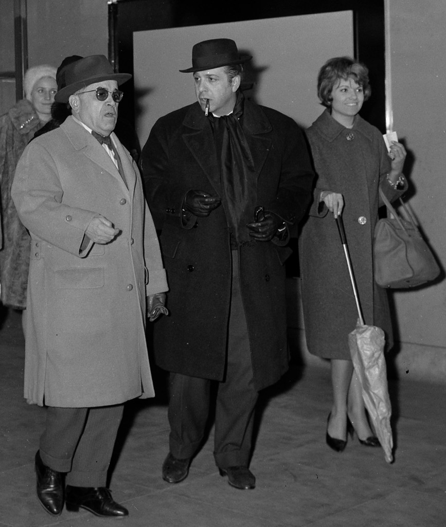 Gare Matabiau. Le 21 Février 1962. Vue de Louis Izard, directeur du théâtre du Capitole, qui acceuille les acteurs Robert Manuel et Jacques Charon, ainsi que leurs dames, à la gare Matabiau, pour présenter la pièce de théâtre La troupe du roy, en hommage à Molière.